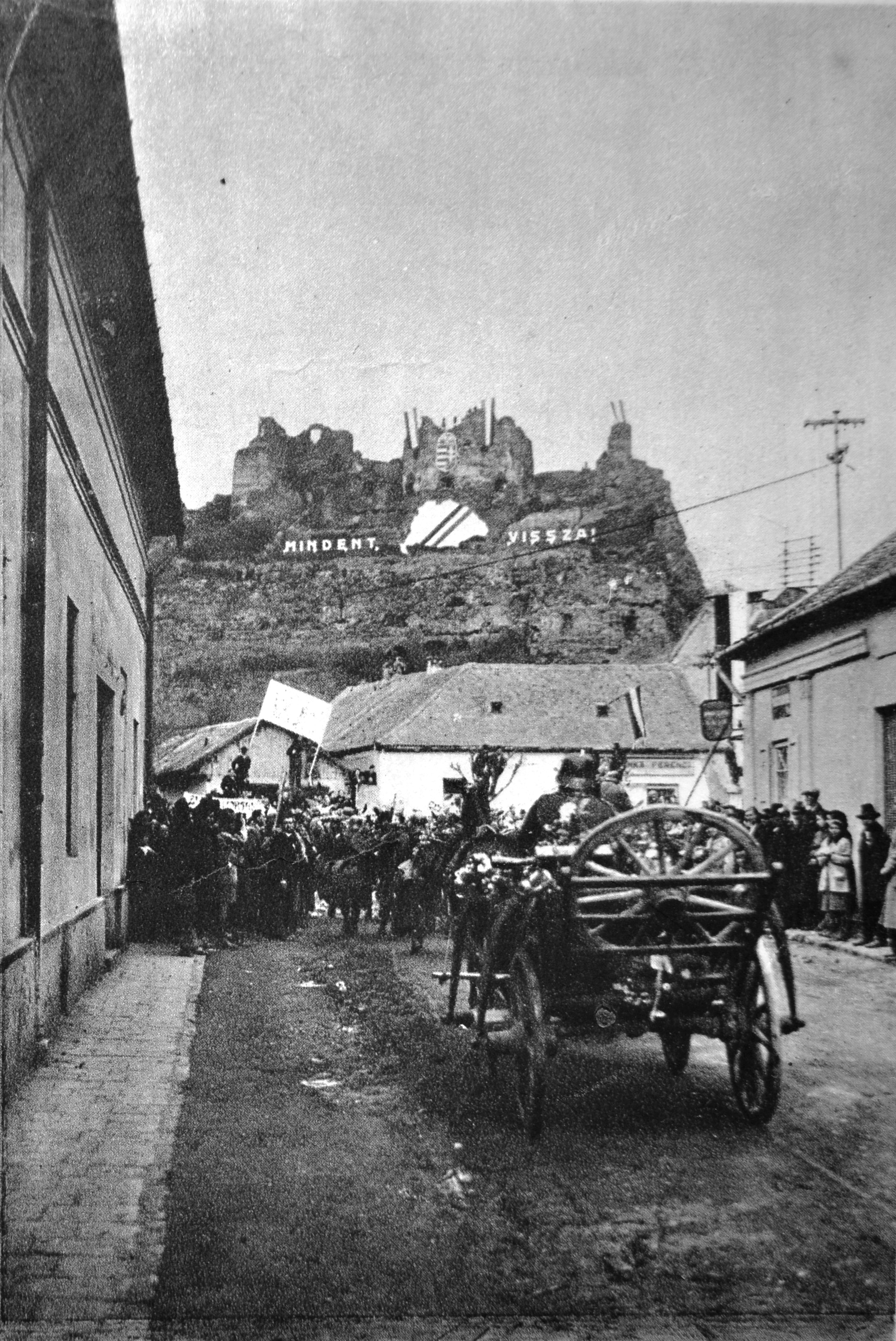 Po prvej viedenskej arbitráži, ktorá sa konala 2. novembra 1938, 10. novembra pripadlo Fiľakovo Maďarsku